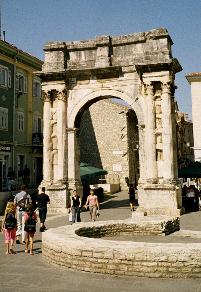 "Golden gate" in Pula